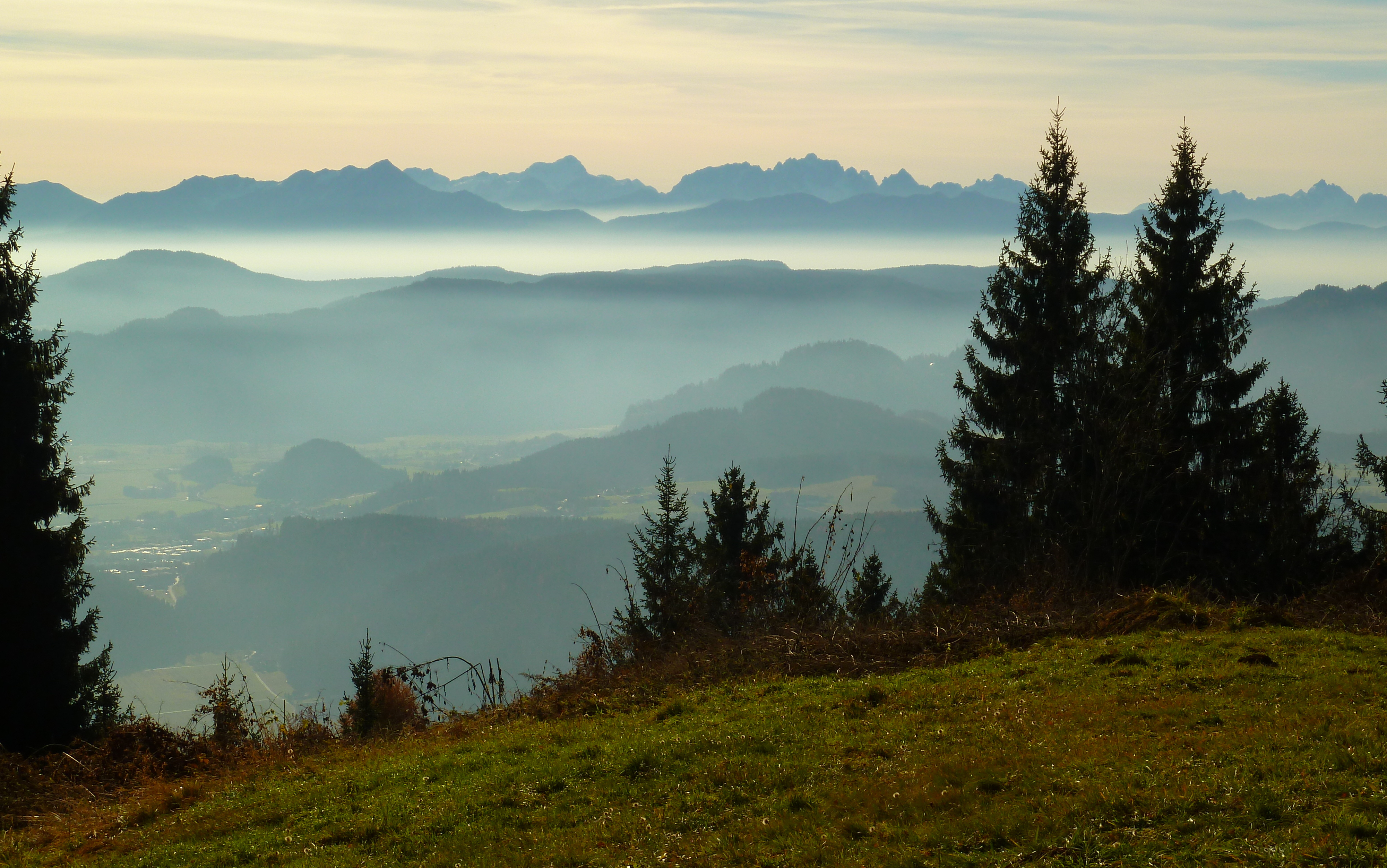 Wachsenberg. Aussicht vom Kitzel nach Süden. Am Horizont die Karawanken und Julischen Alpen.